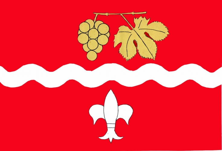 vlajka, Podmolí, okres Znojmo